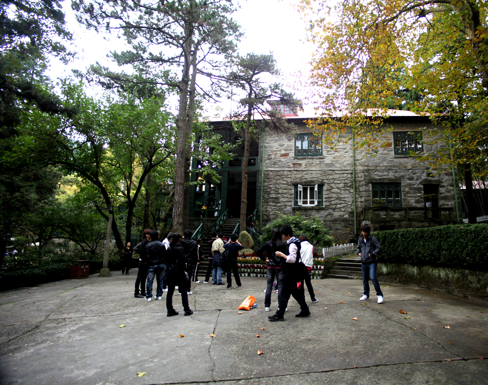 庐山美庐